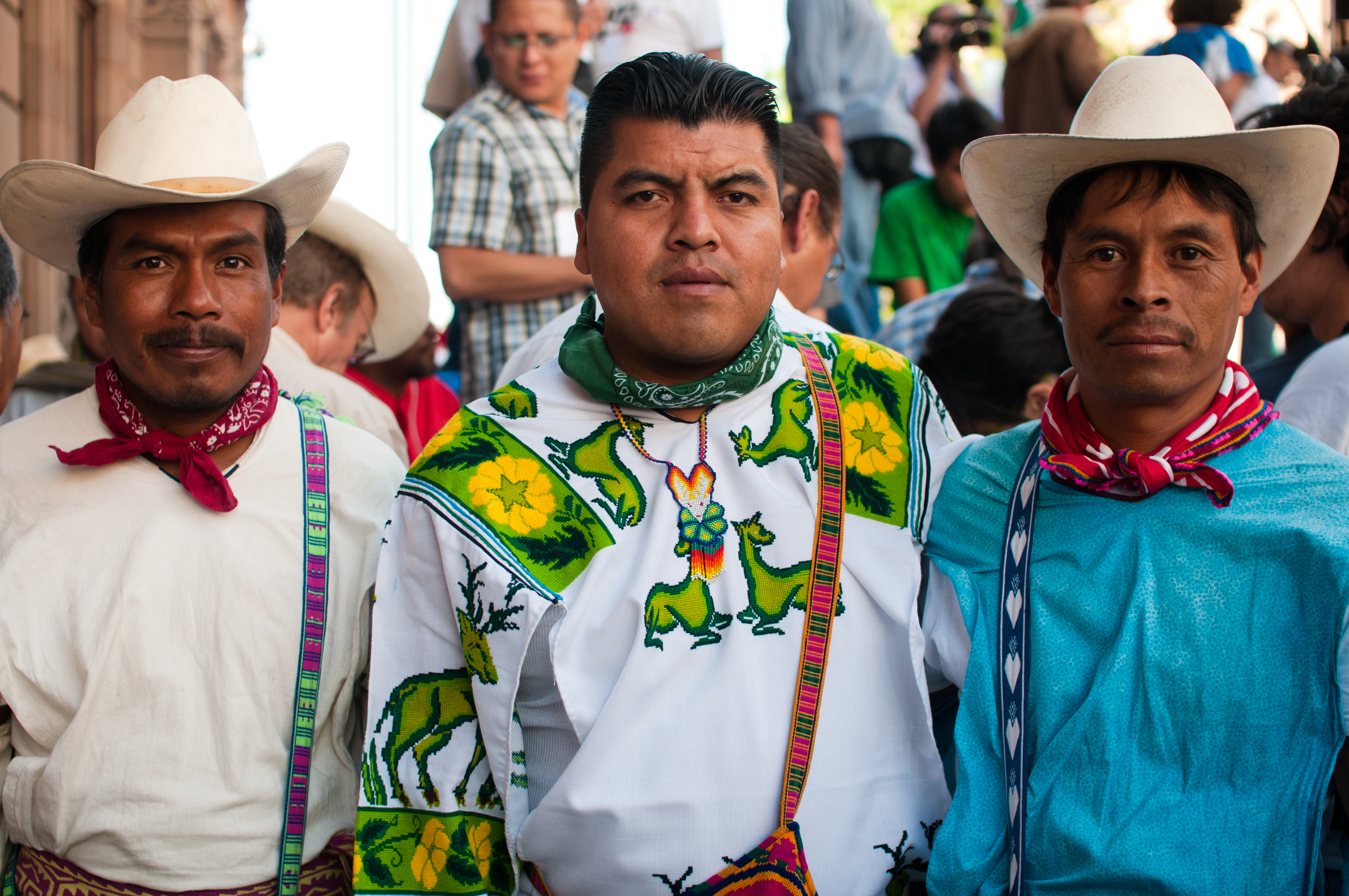 Y con el centro, parte de la riqueza cultural de nuestra alocada humanidad.